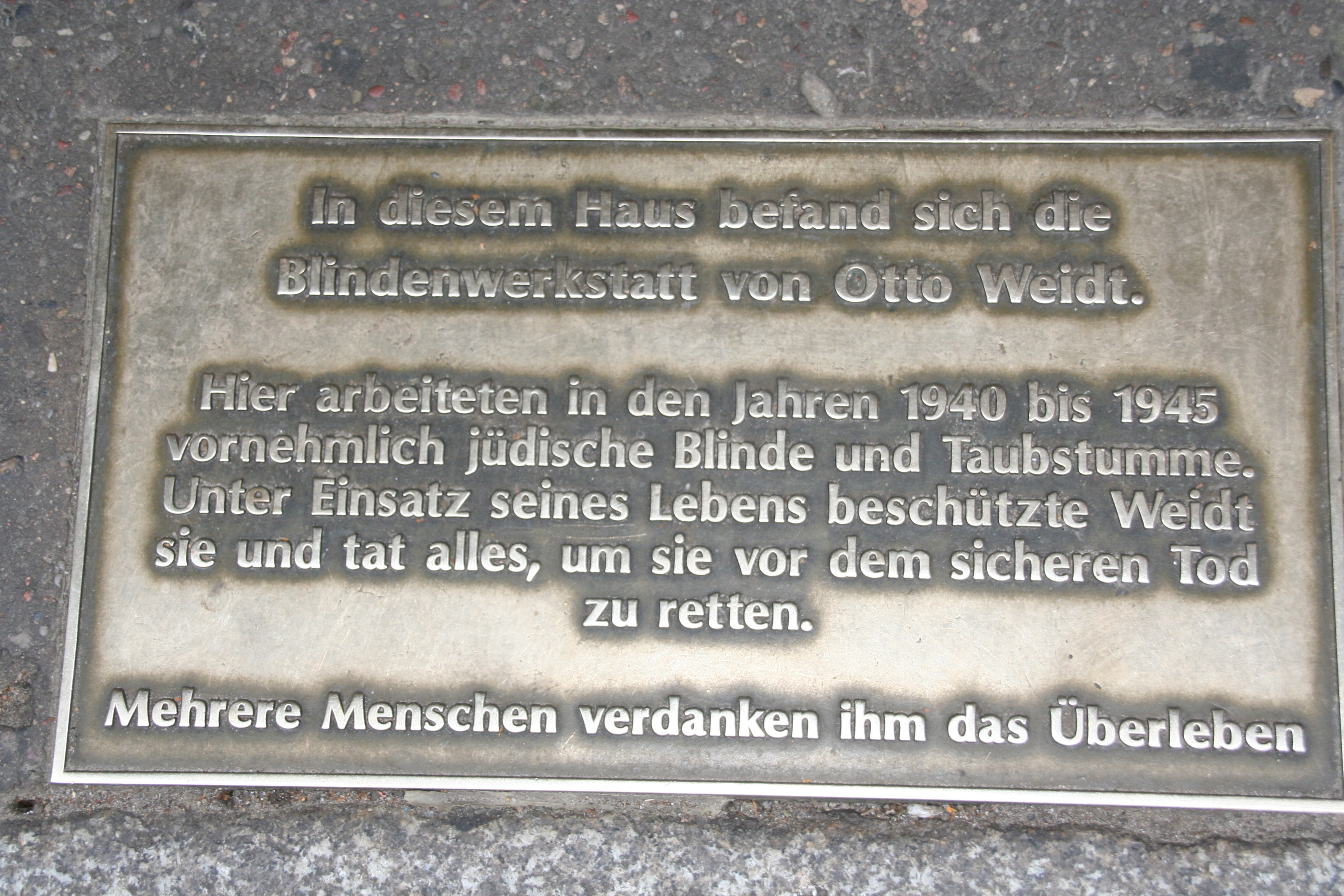 "pavé mémoriel"